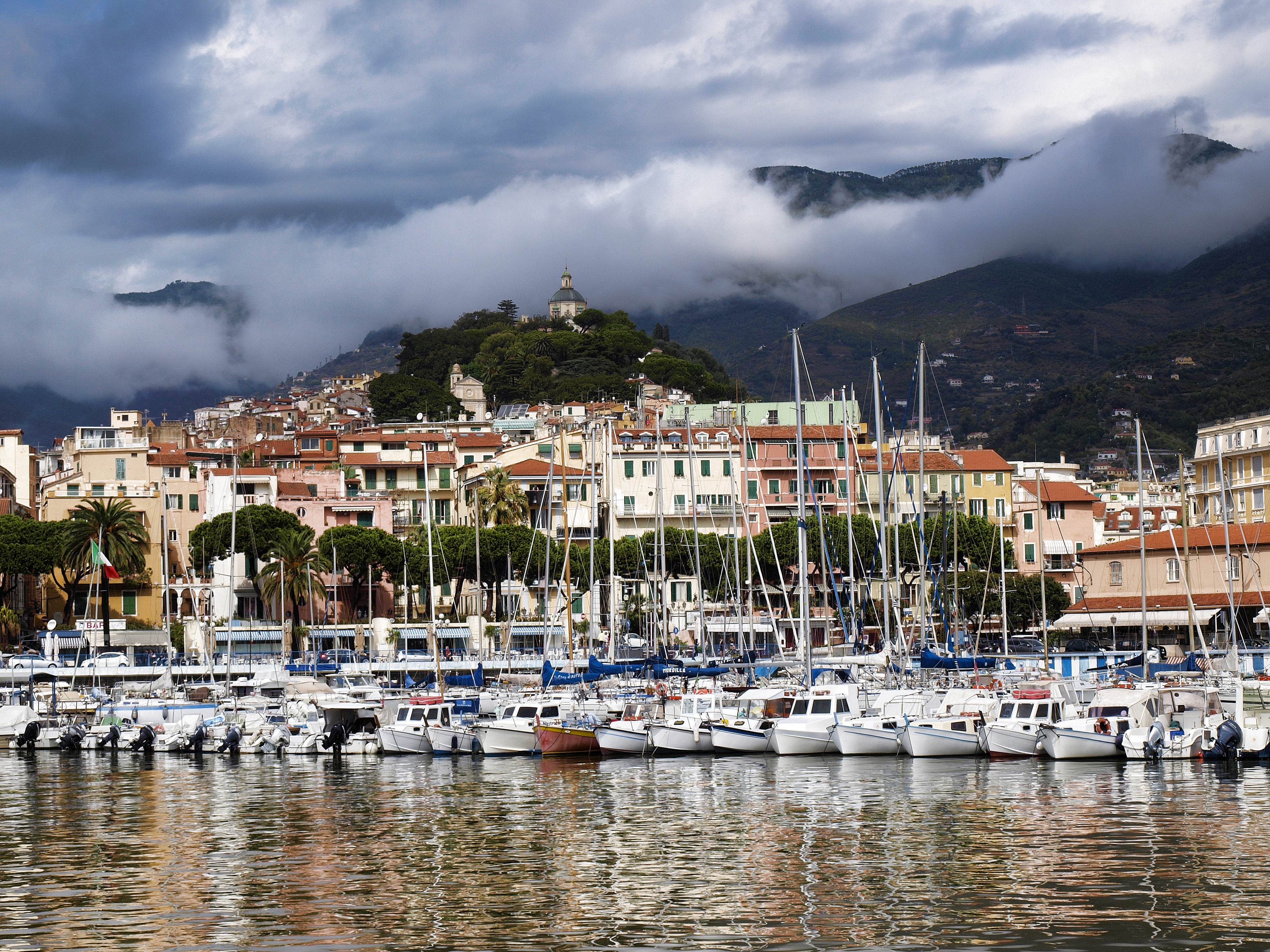 18038 Sanremo IM, Italy